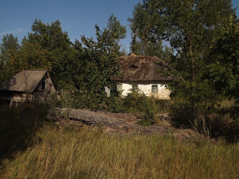 Двір у селі Постав-Мука Чорнухинського району Полтавської області